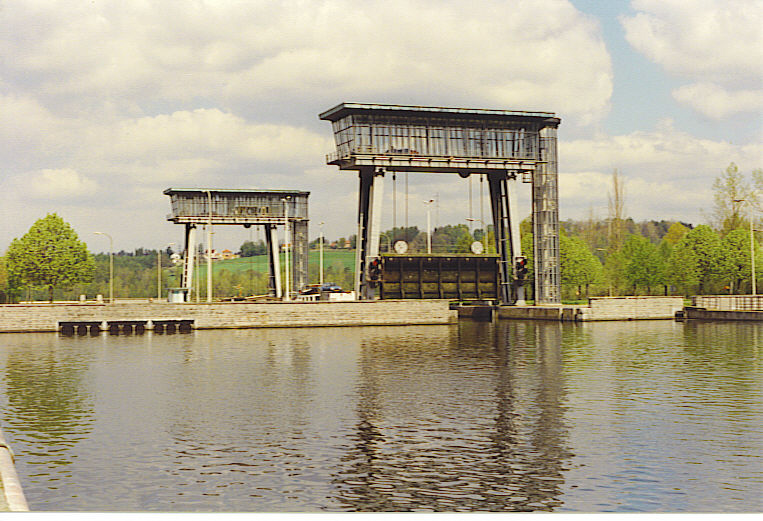 propre photo